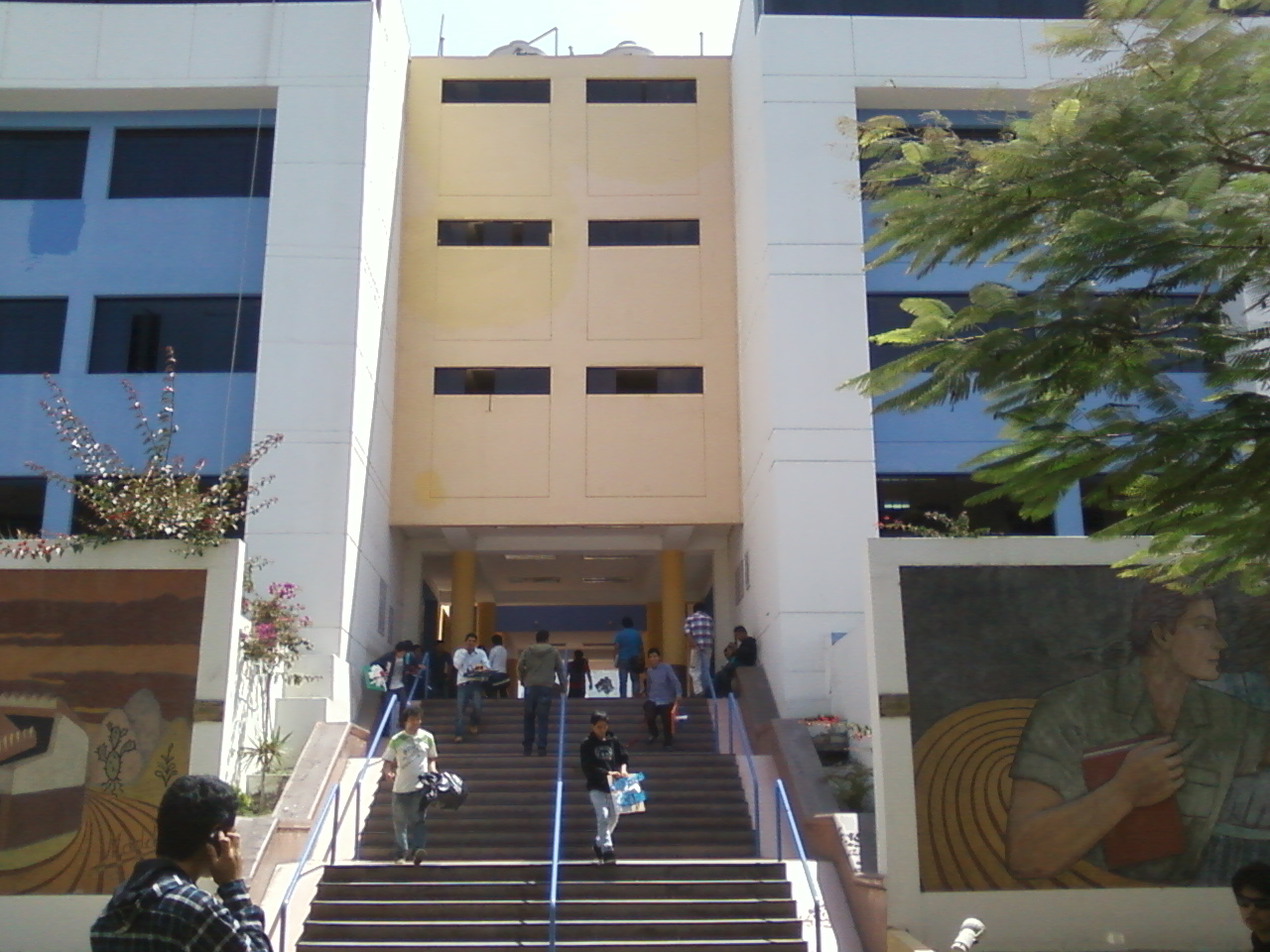 Vista del interior del campus Los Pinos en Chimbote